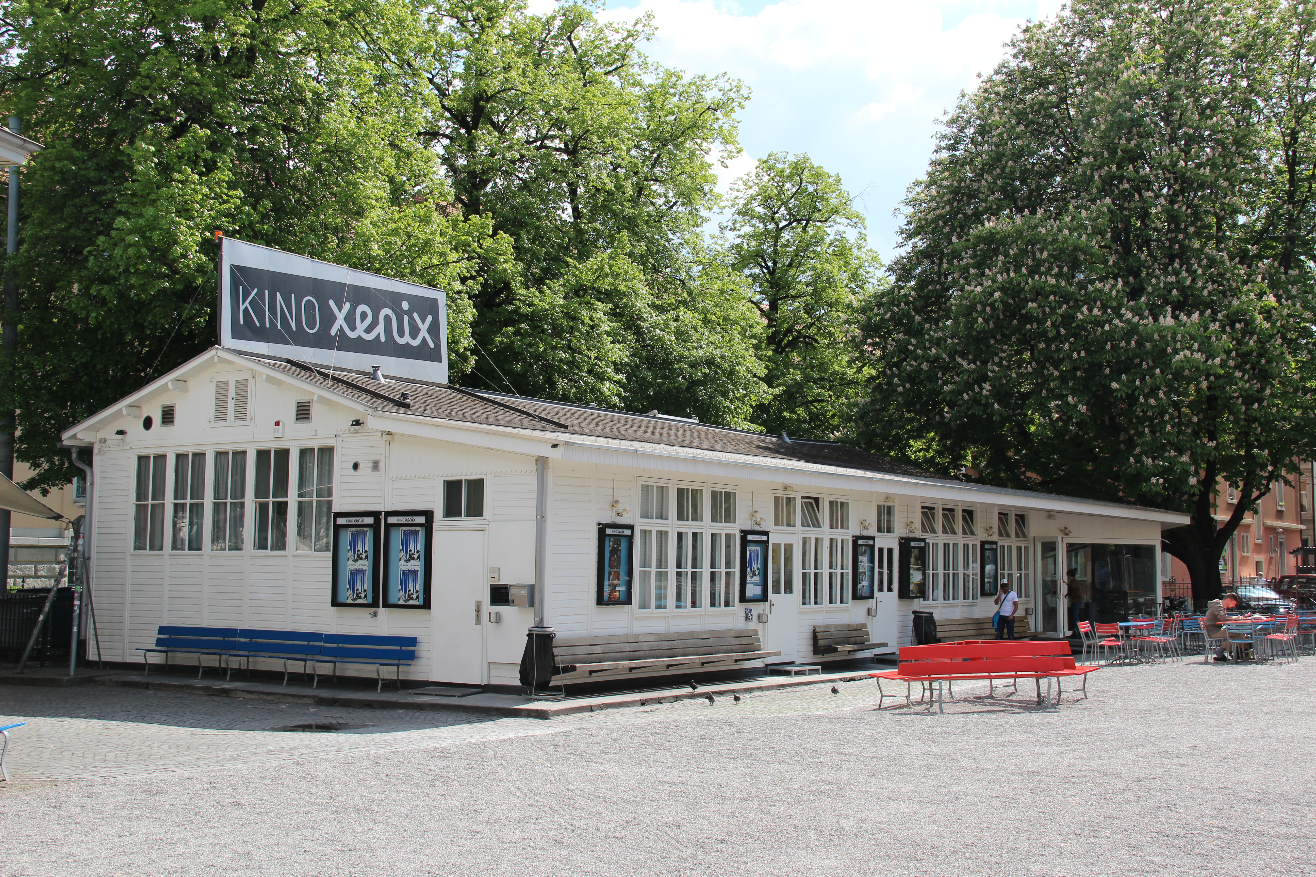 Kino Xenix, Baracke